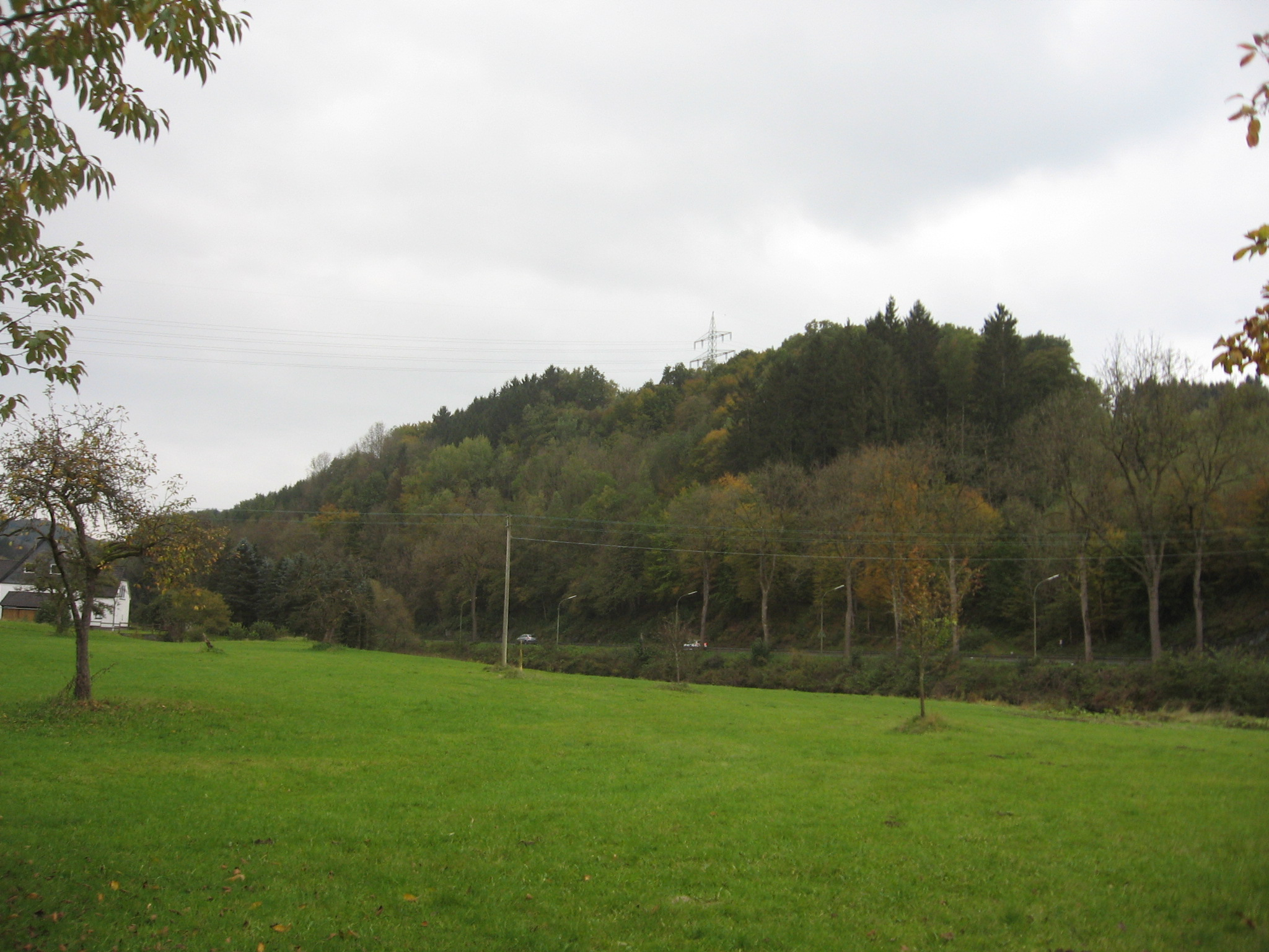 Naturschutzgebiet Muttersteinhöhle (Hügel mit Wald, oberhalb der Straße)